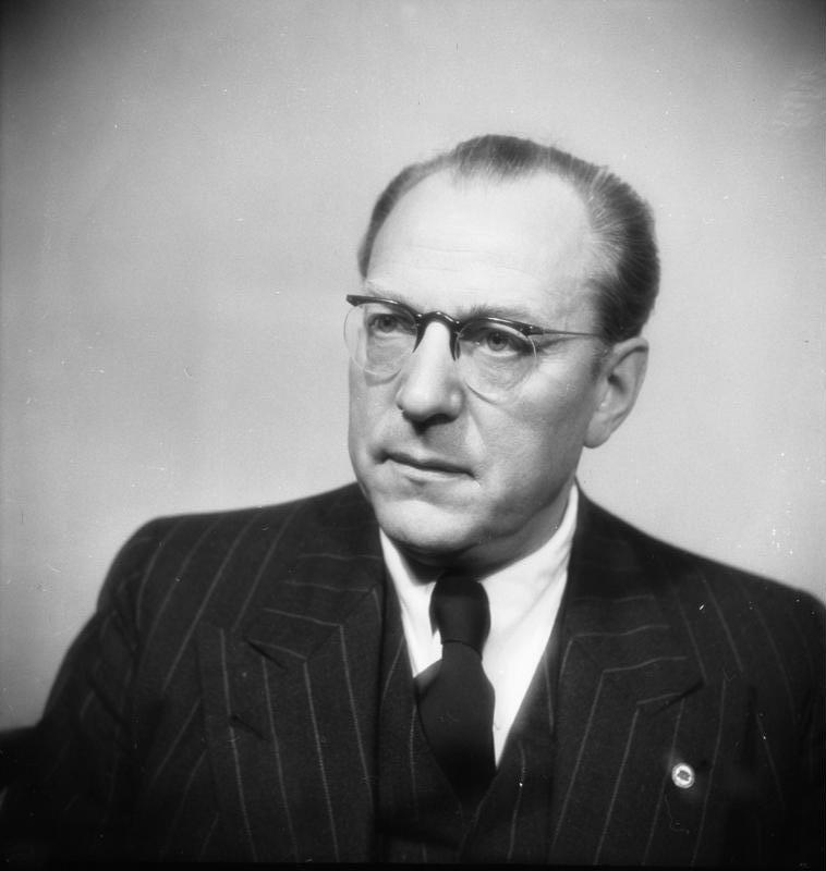 Otto Grotewohl Zentralbild Otto Grotewohl, Staatsmann und Arbeiterführer, geb.: 11.3.1894 in Braunschweig, gest.: 21.9.1964 in Berlin, Vorsitzender des Ministerrates der DDR; 1945 wurde Grotewohl Vorsitzender des Zentralausschusses der SPD, nach Vereinigung der beiden Arbeiterparteien wurde er gemeinsam mit W. Pieck Vorsitzender der SED, seit 1946 Mitglied des ZK und des Politbüros der SED. (Aufnahme vorm 30.10.1950) [Porträt Otto Grotewohl] Abgebildete Personen: Grotewohl, Otto: Ministerpräsident, stellvertretender Staatsratsvorsitzender, DDR (GND 118542680)